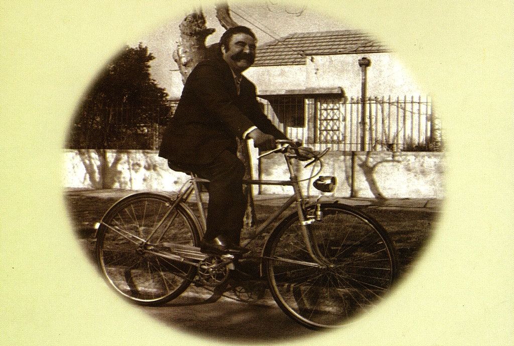 Mario Palestro Rojas (Santiago, 2 de diciembre de 1921 — San Miguel, 10 de mayo de 2000) Político chileno, Parlamentario, Alcalde y Regidor, militante del Partido Socialista de Chile.